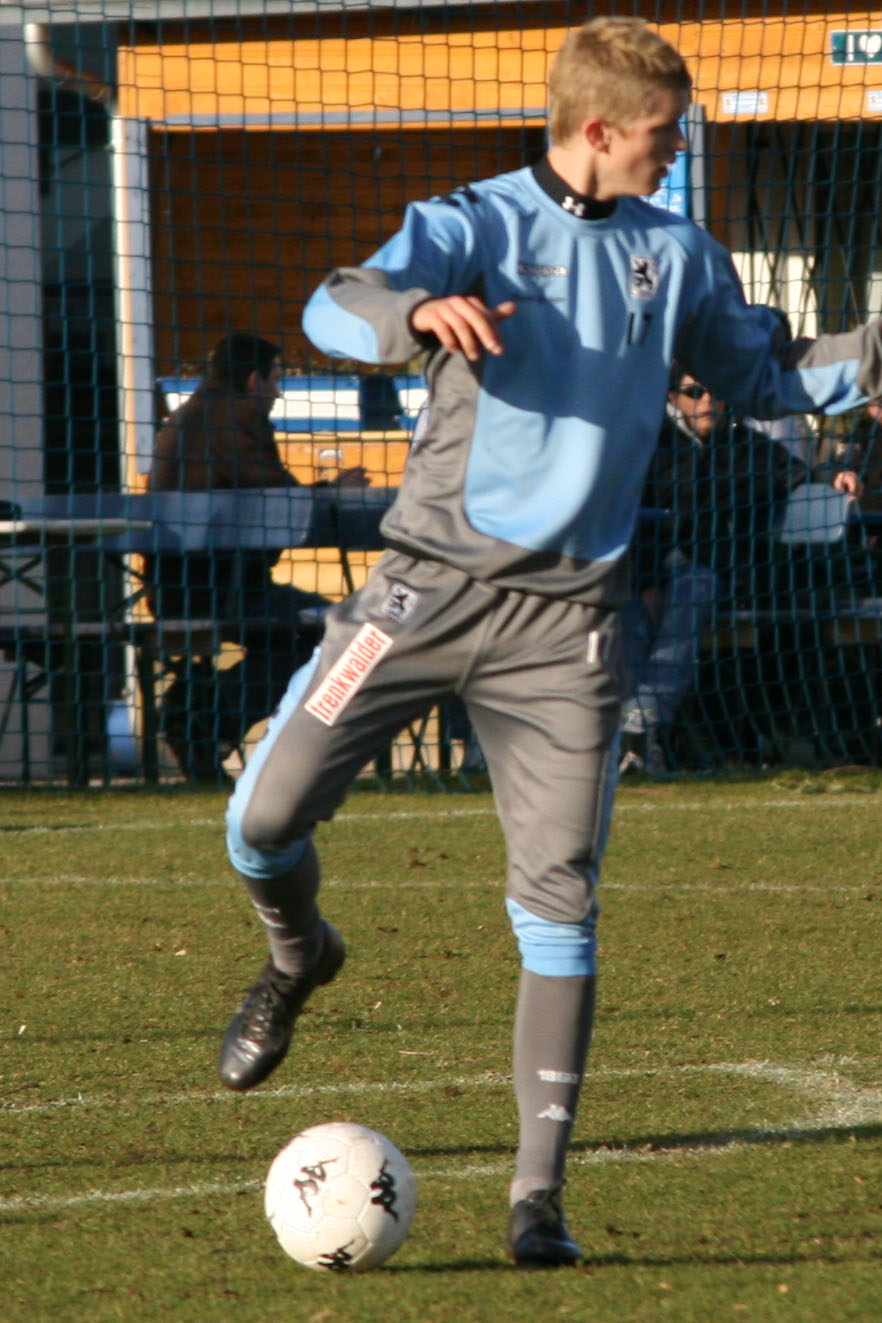 Sven Bender, player of TSV 1860 München, training, 20.01.2007, Grünwalder Str., Munich